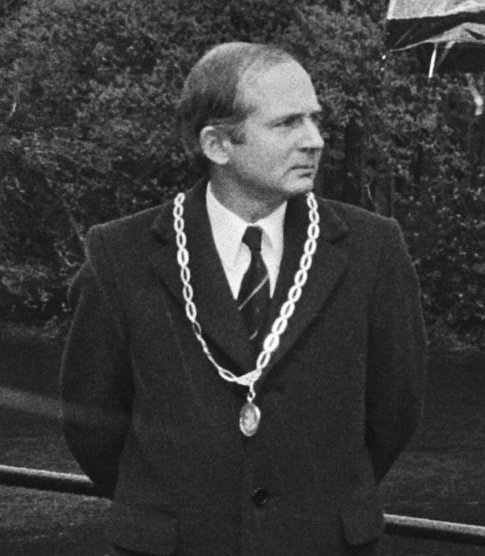 Collectie / Archief : Fotocollectie Anefo Reportage / Serie : [ onbekend ] Beschrijving : Prinses Beatrix en Prins Claus openen kasteel Vorden als gemeentehuis van Vorden; Beatrix en Claus bekijken in stromende regen het nieuwe gemeentehuis / Datum : 12 mei 1978 Locatie : Gelderland, Vorden Trefwoorden : gemeentehuizen, openingen Persoonsnaam : Beatrix, prinses, Claus, prins Fotograaf : Suyk, Koen / Anefo Auteursrechthebbende : Nationaal Archief Materiaalsoort : Negatief (zwart/wit) Nummer archiefinventaris : bekijk toegang 2.24.01.05 Bestanddeelnummer : 929-7164